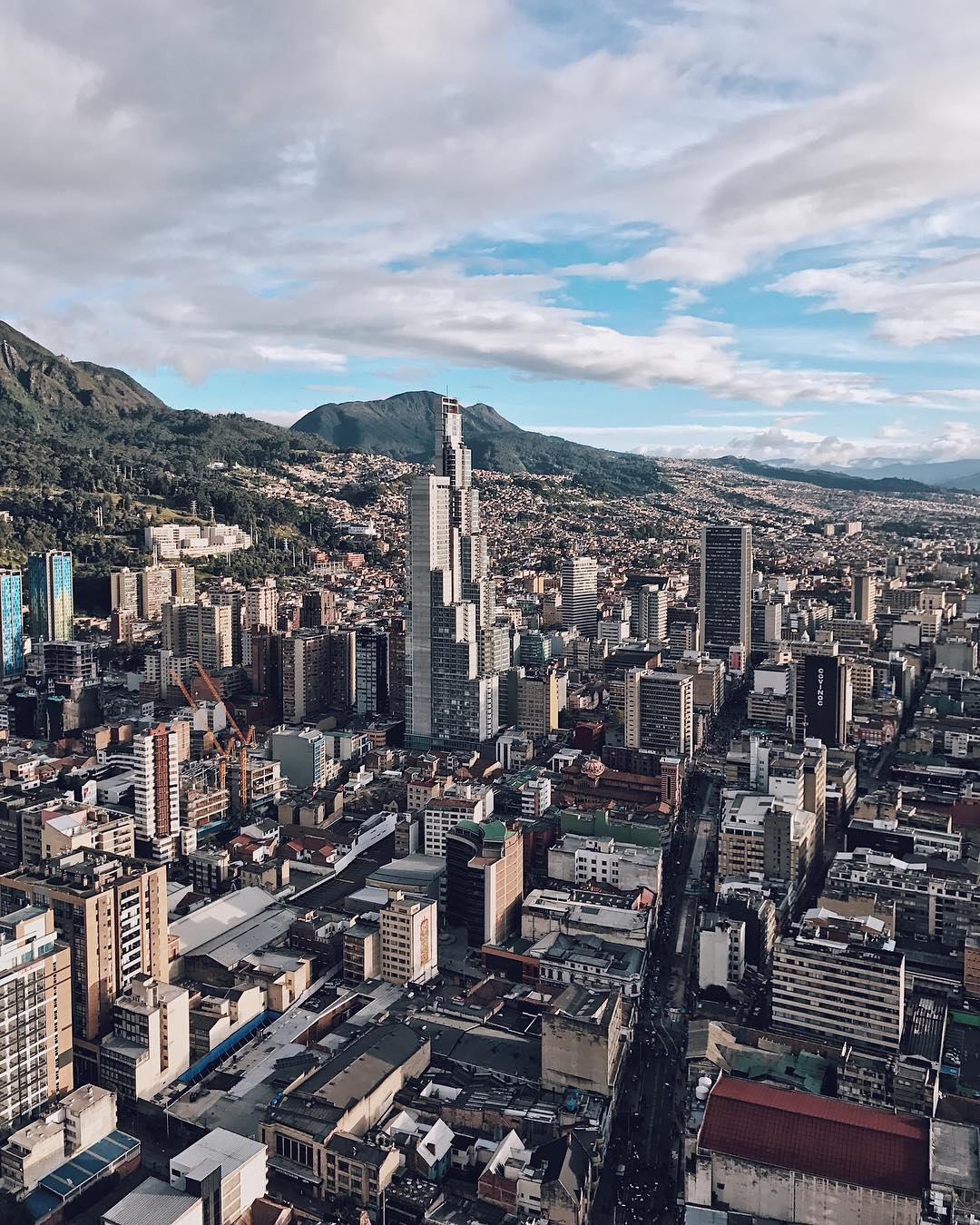 Centro de Bogotá